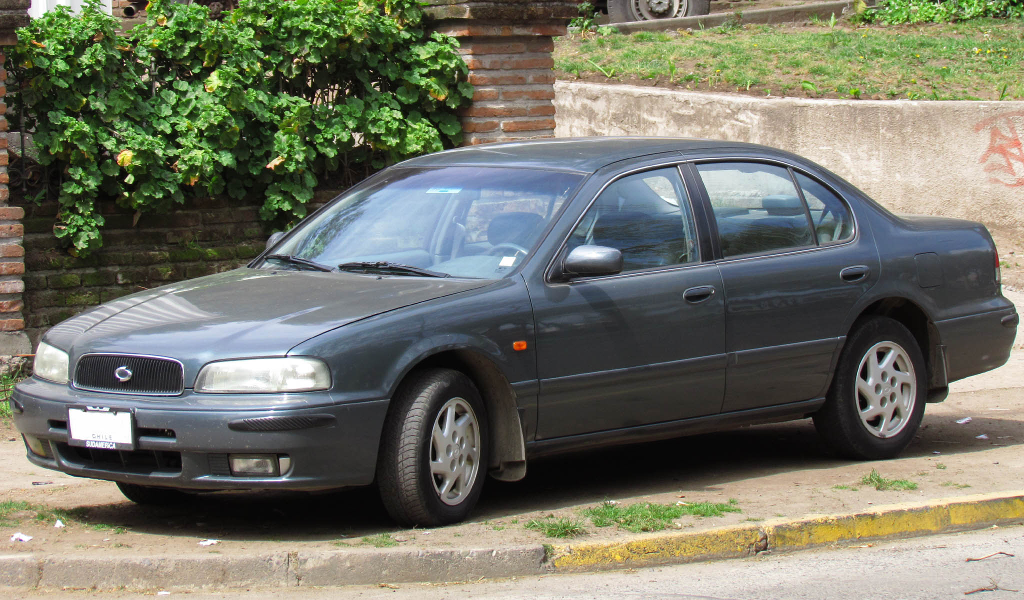 Samsung SQ5 1999